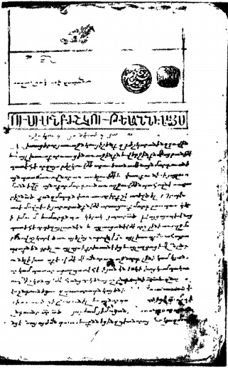 Титульный лист рукописи «Учение медицины» (1459 год, черно-белая ксерокопия) Титульный лист рукописи «Учение медицины» (1459 год, черно-белая ксерокопия)